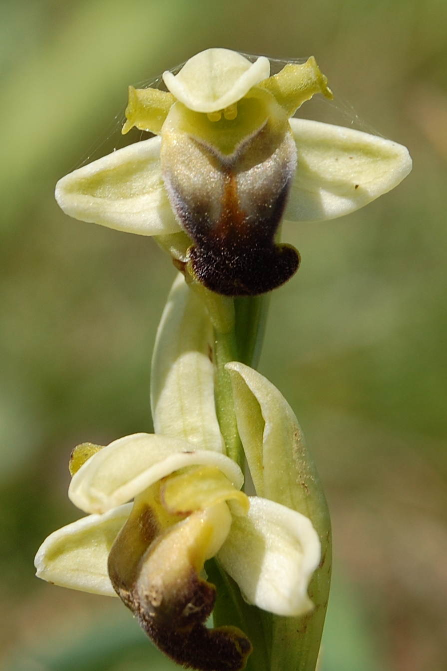 Ophrys pallida Raf. Bosco della Ficuzza, Sicily